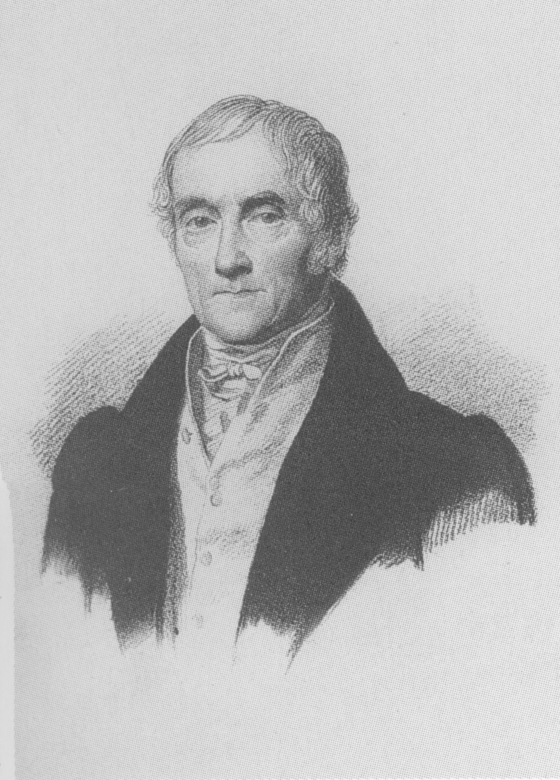 Porträt von Prof. Wilhelm Traugott Krug (1770–1842), deutscher Philosoph